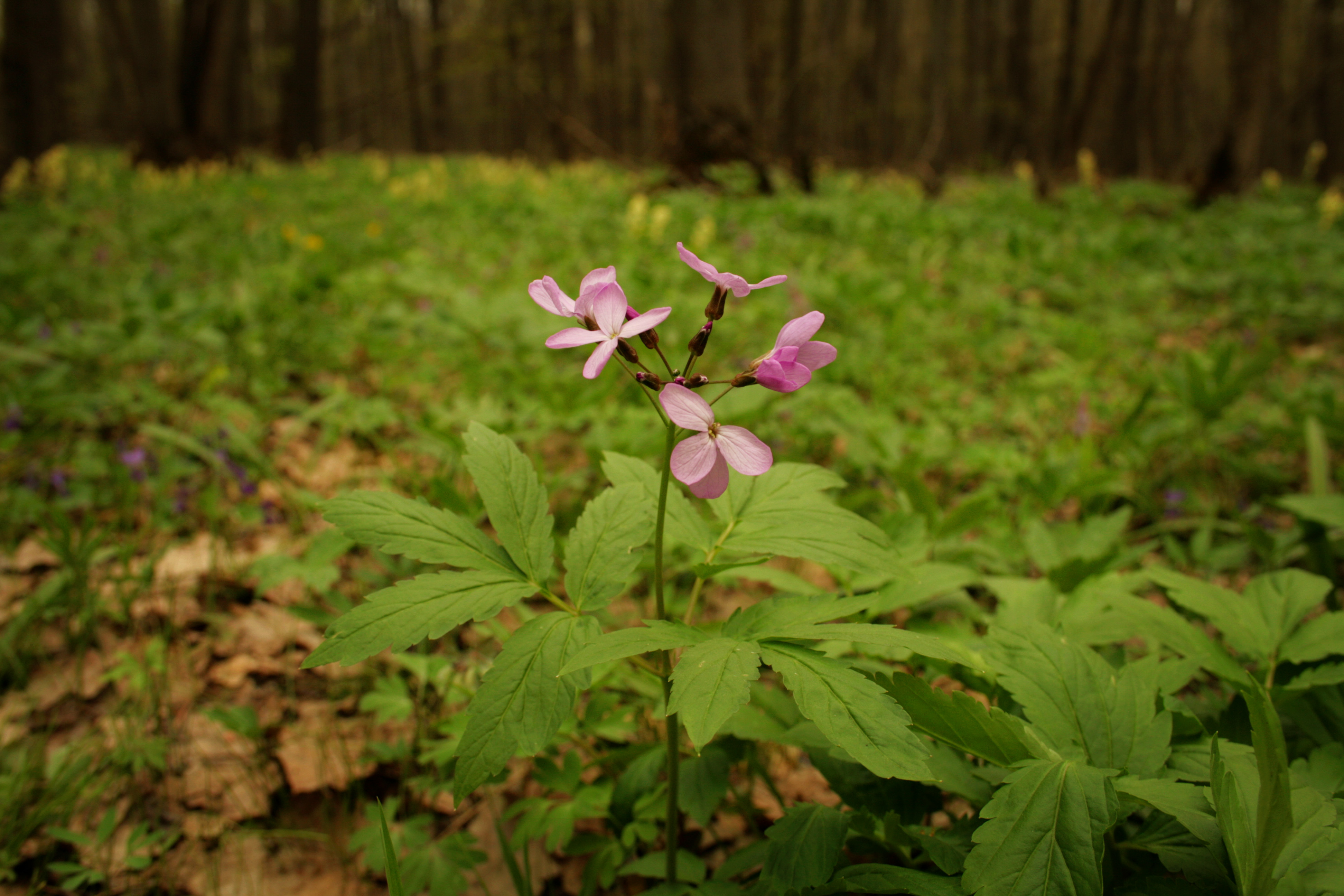 Зубянка пятилистная (Dentaria quinquefolia). Родовое экопоселение «Кореньские родники», Шебекинский район, Белгородская область. 2013